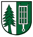 Wappen der Ortsgemeinde Damscheid